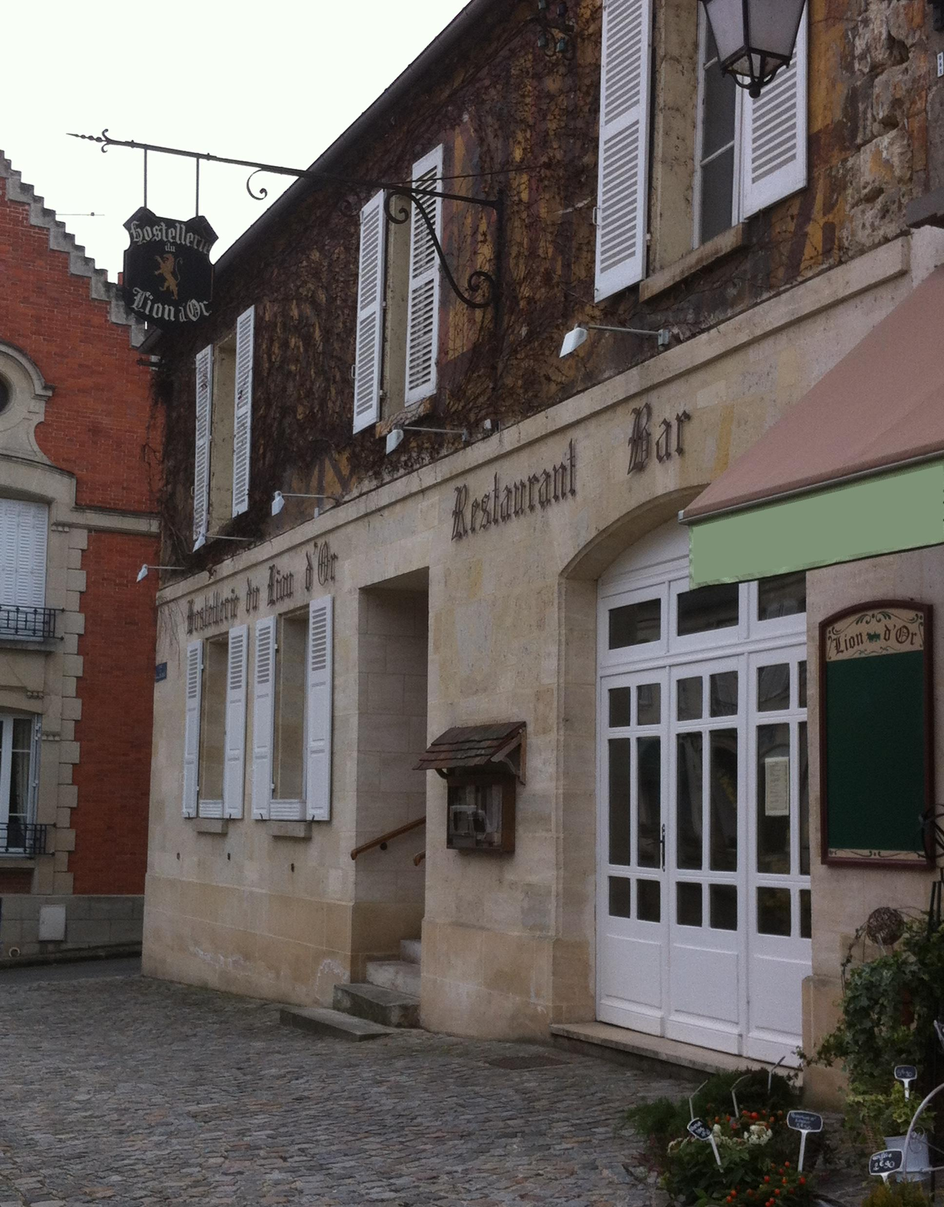 Vic-sur-Aisne - Hostellerie du Lion d'Or, établie en 1580